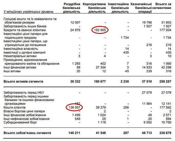 Діяльність "ПриватБанку" за сегментами за фінансовою звітністю у 2016р.